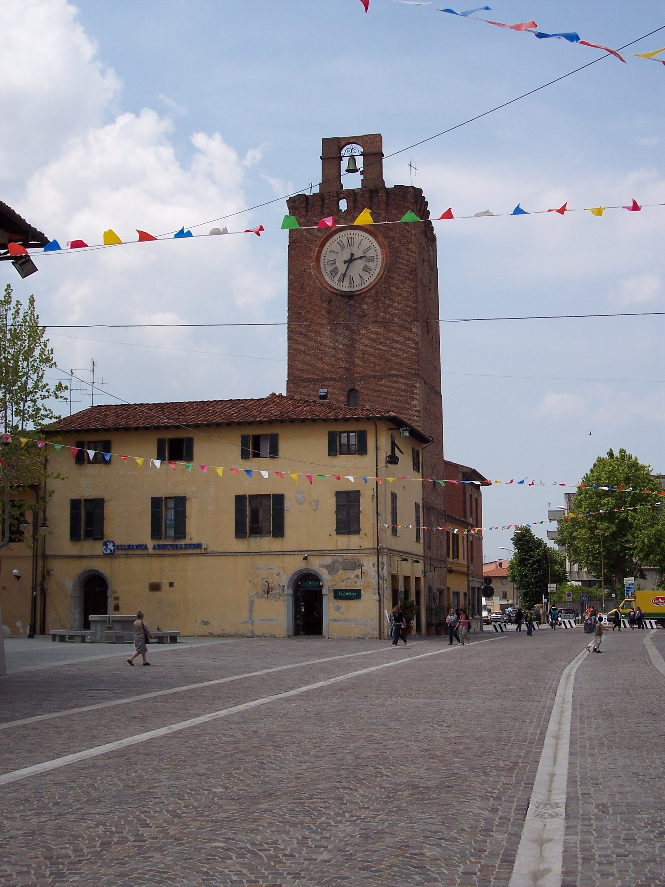 torre civica di Cascina (Pi)